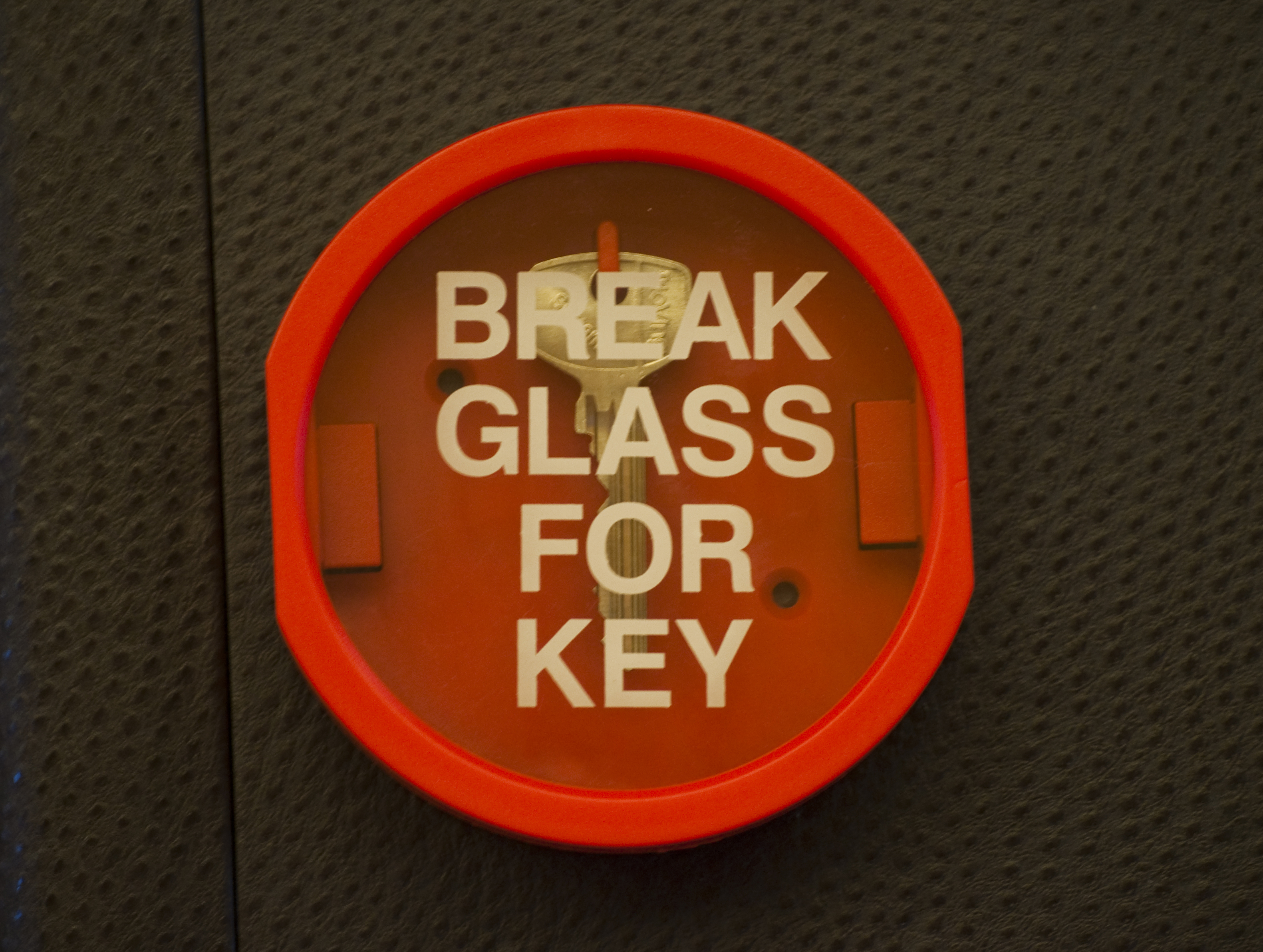 sign, key, glass